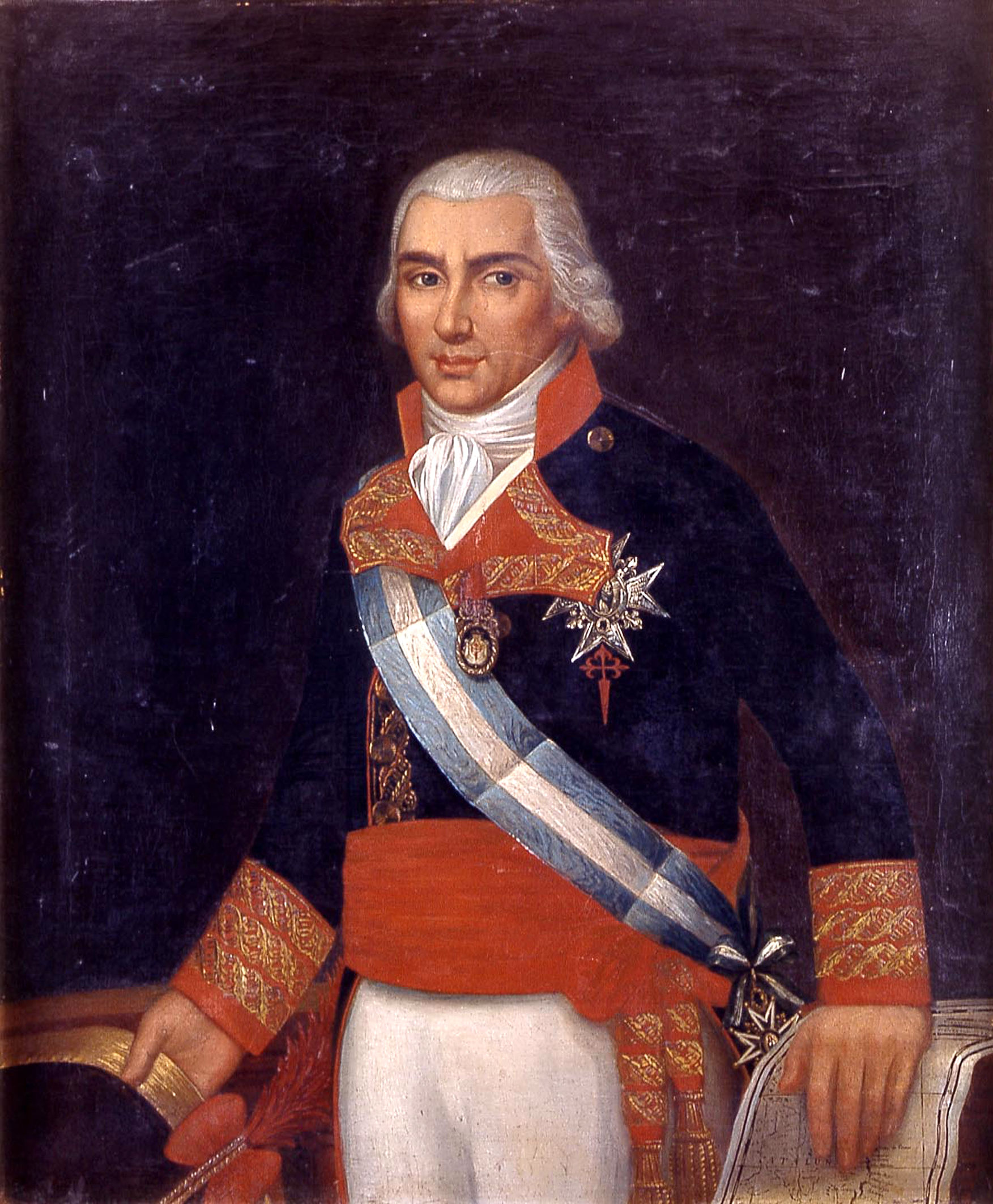 Retrato del marino español Federico Gravina (1756-1814), que fue capitán general de la Real Armada Española y caballero de la Orden de Santiago. El retratado aparece en pie, de medio cuerpo, y vistiendo uniforme pequeño de capitán general, que en aquella época era idéntico para el Ejército y la Armada. Además, aparece con las solapas abrochadas a la usanza y moda de la Armada, y luce la venera y la cruz de caballero de la Orden de Santiago, de la que era caballero, y la banda y la cruz de la Orden de Carlos III. Y el retrato fue pintado con toda probabilidad tras la muerte del teniente general.